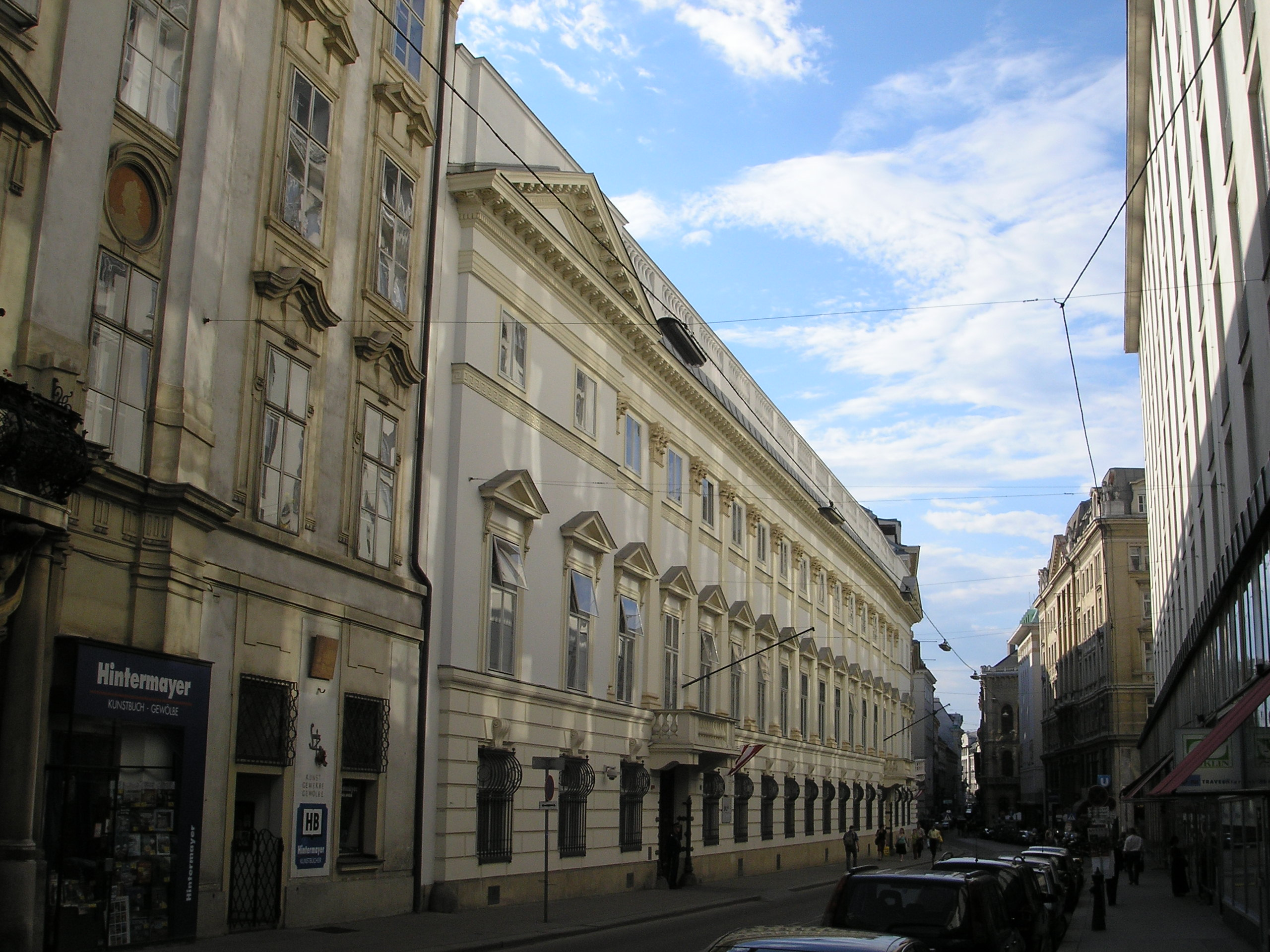 Palais Modena in Vienna, at Herrengasse